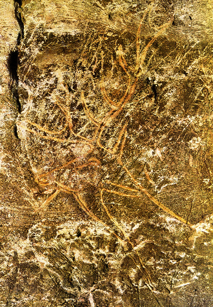 Grotte de Lascaux, Dordogne (France) - Abside, cerfs gravés.